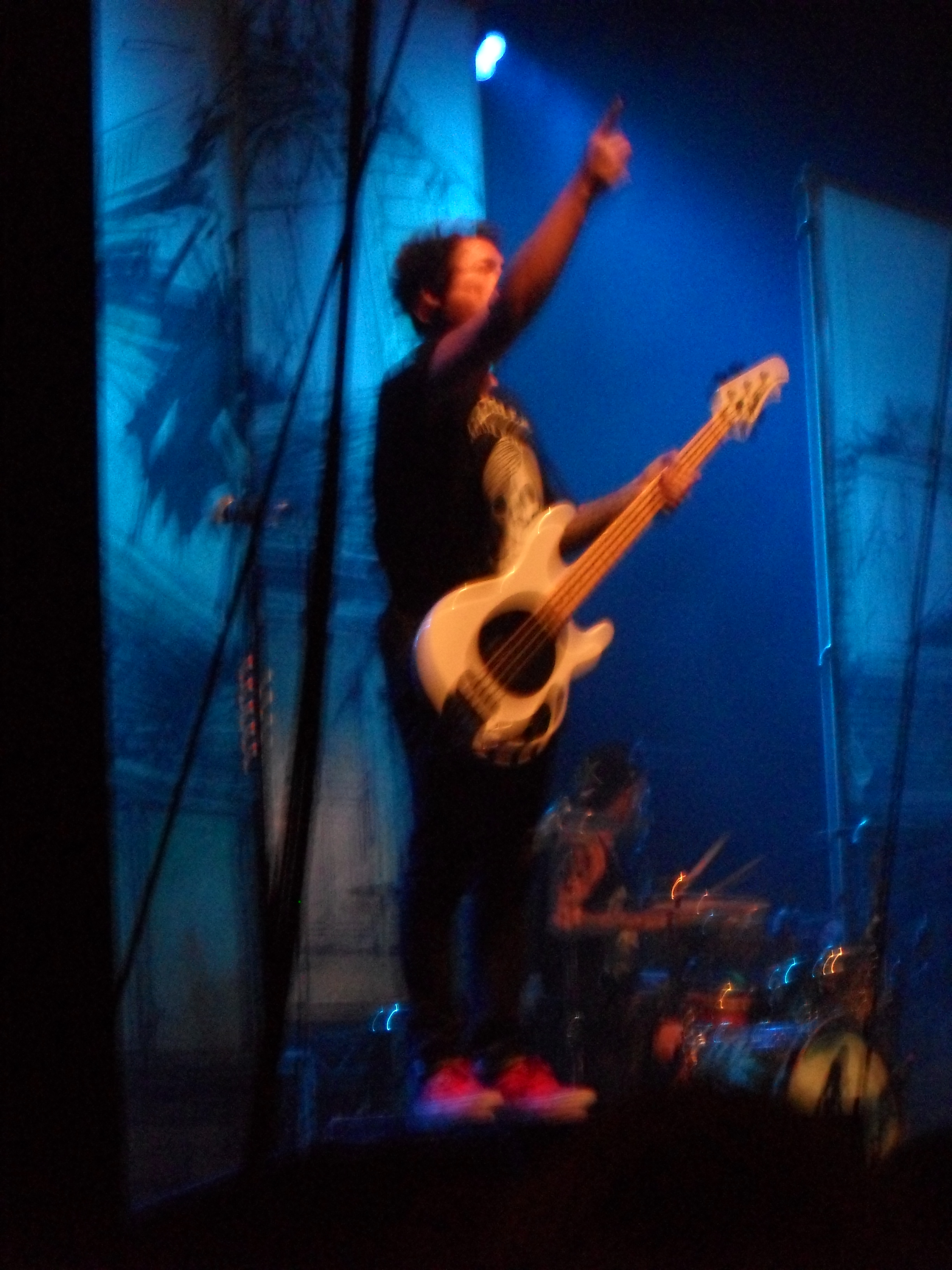 Jaime Preciado bei einem Auftritt von Pierce the Veil am 9. November 2013 im E-Werk, Köln (im Hintergrund: Schlagzeuger Mike Fuentes).